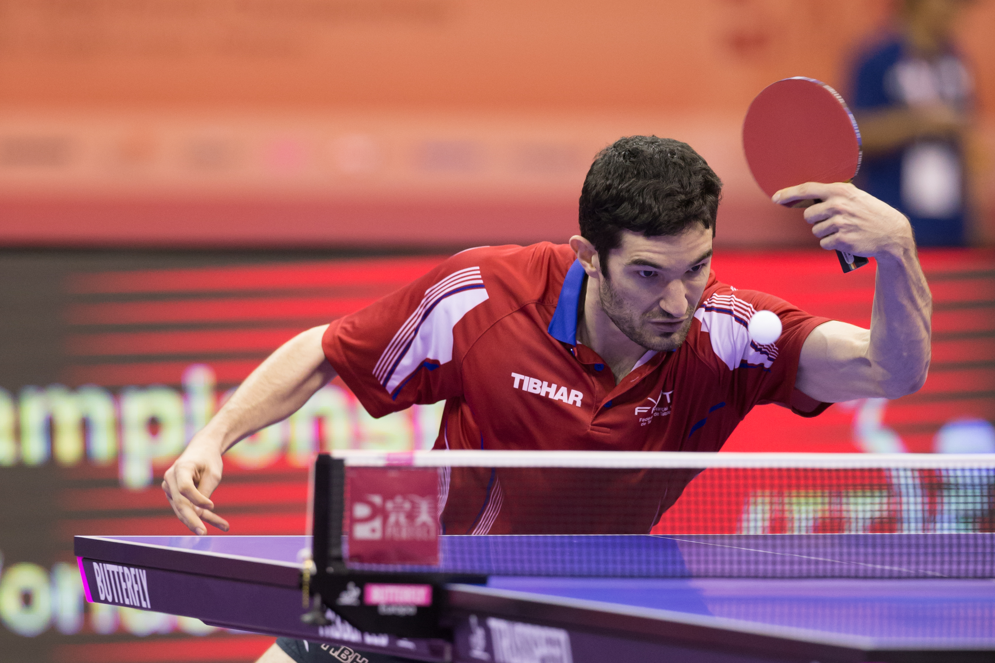 _K0K4413